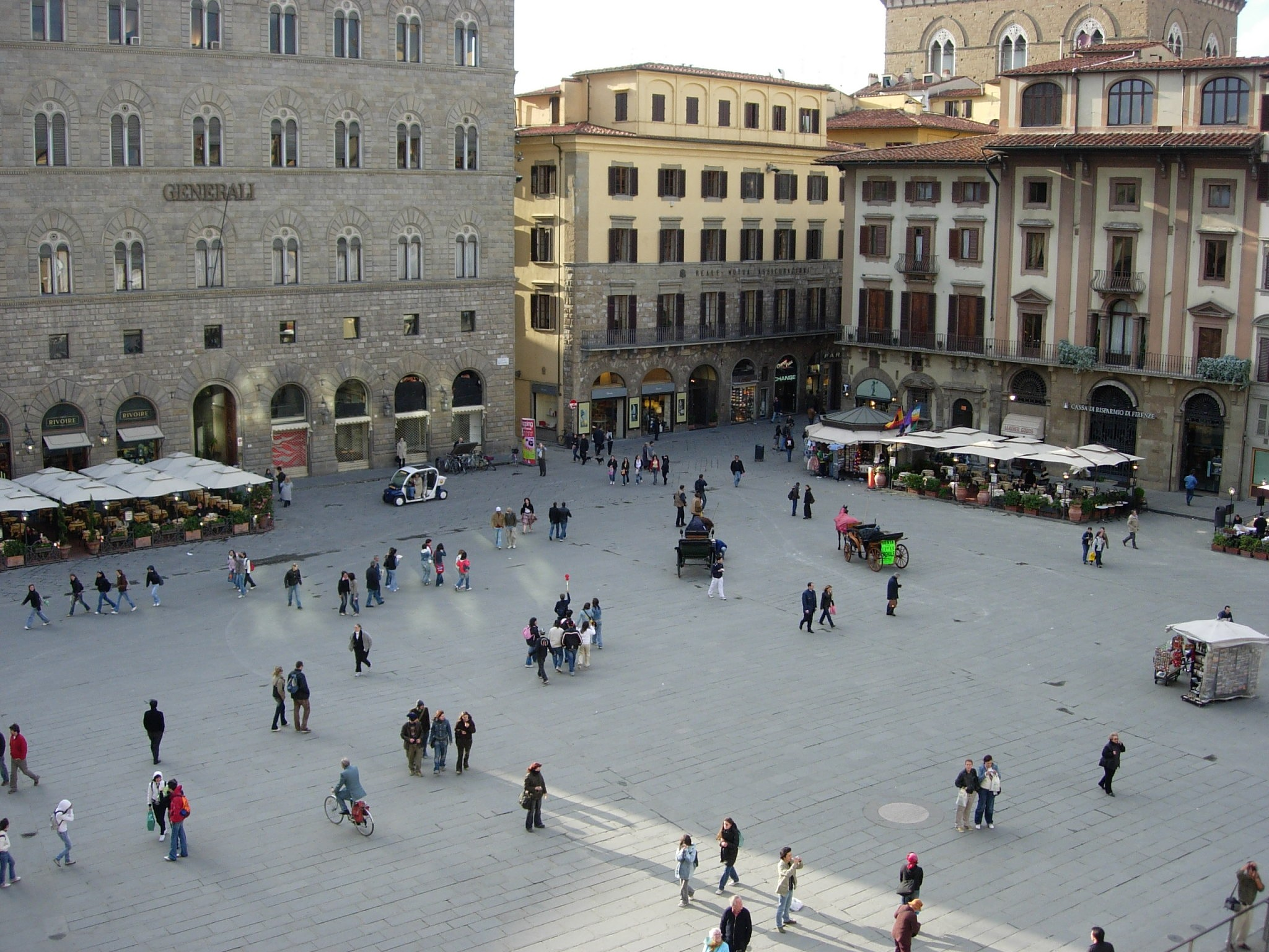 View at Piazza della Signoria from the front balcony of Palazzo Vecchio, in Florence